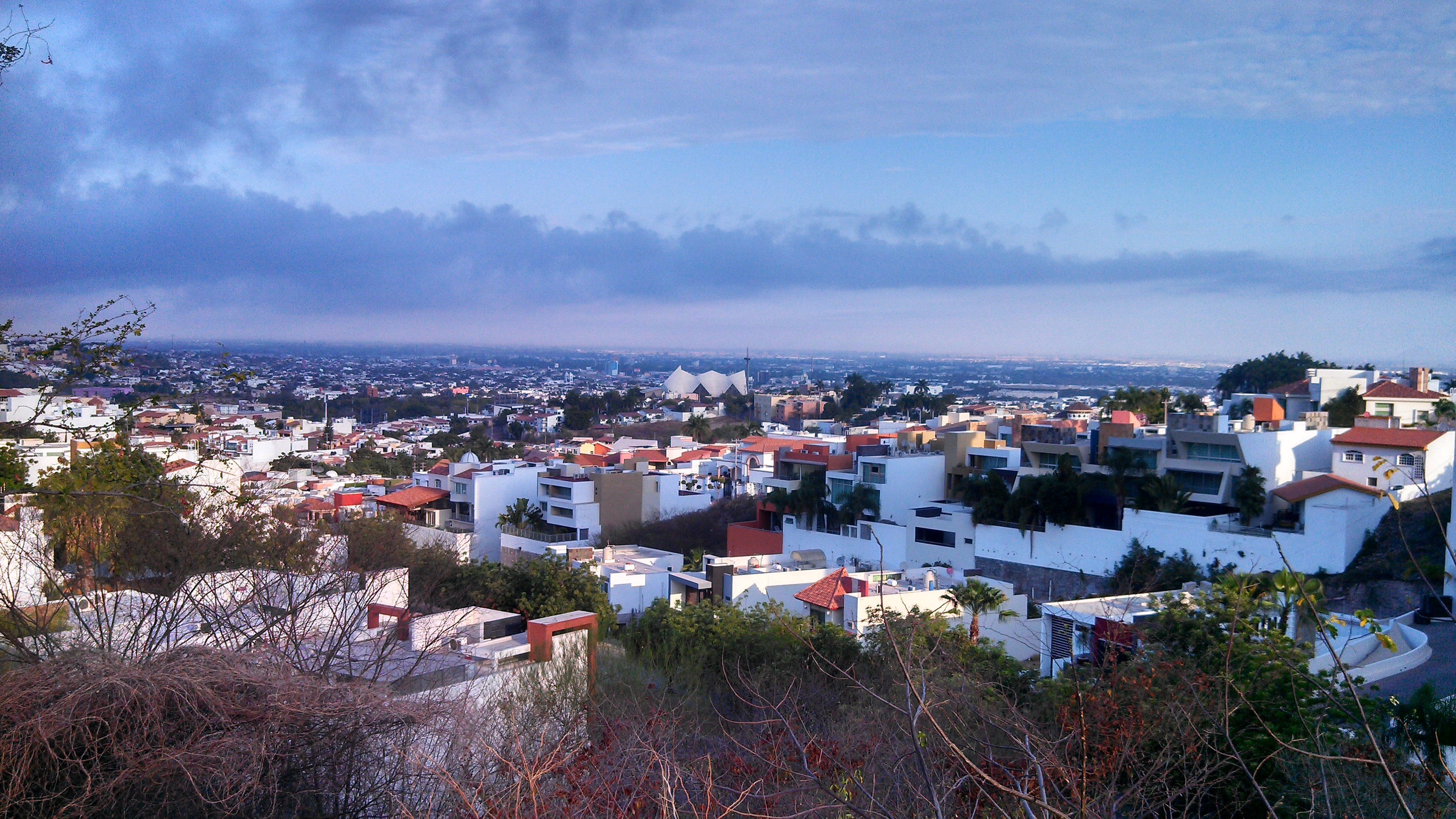 Se aprecia el Templo de La Lomita, imágen tomada desde el Cerro de Canal 3